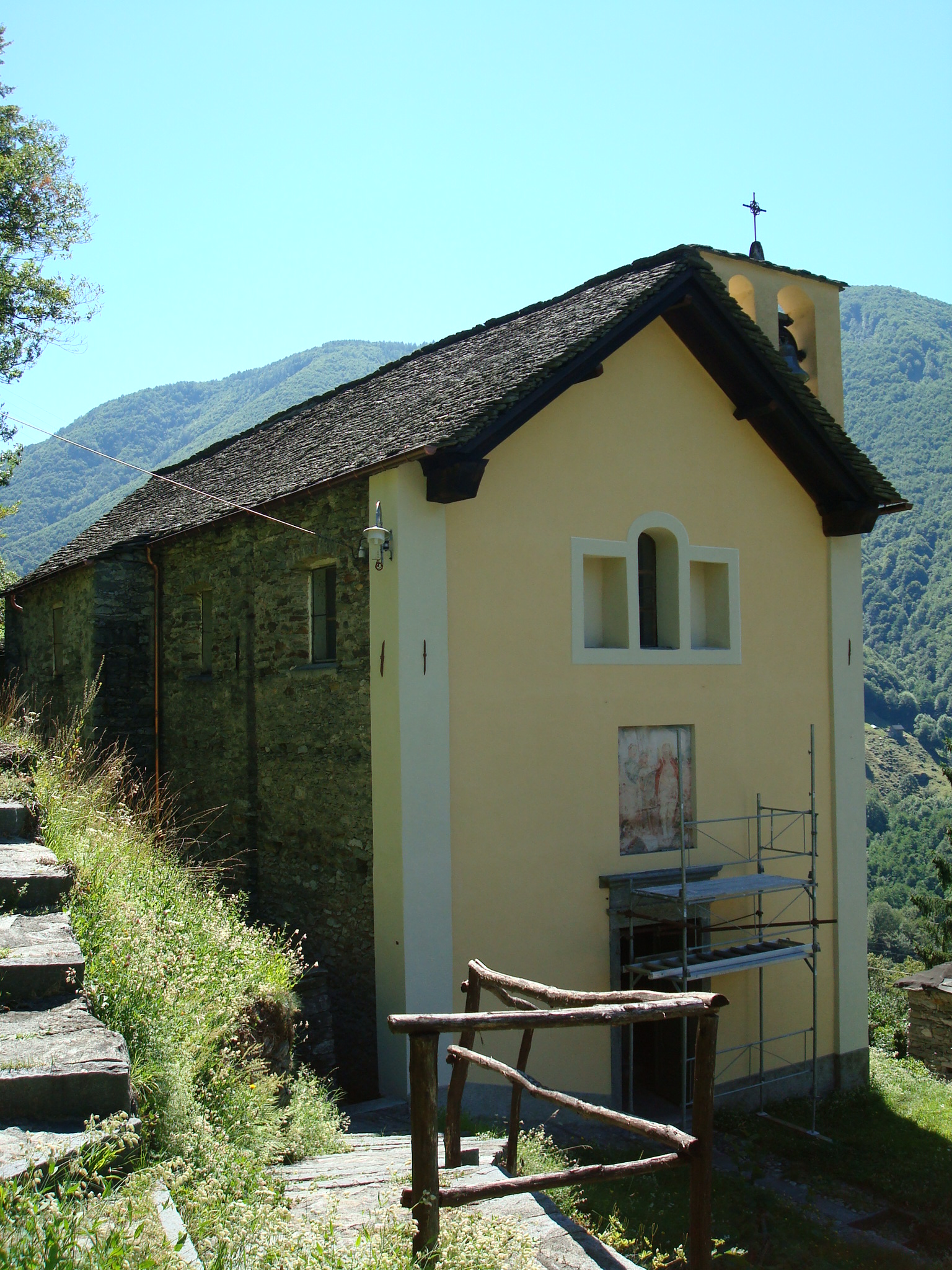 La chiesa di Santa Maria Addolorata a Mosogno-Sotto